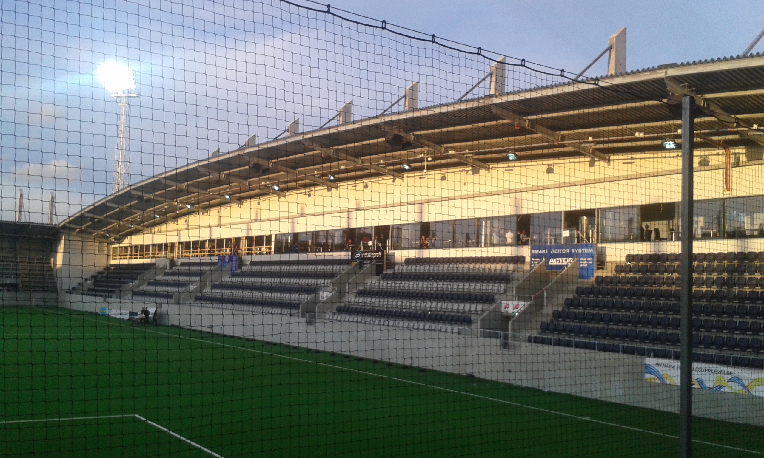 Gavlevallen